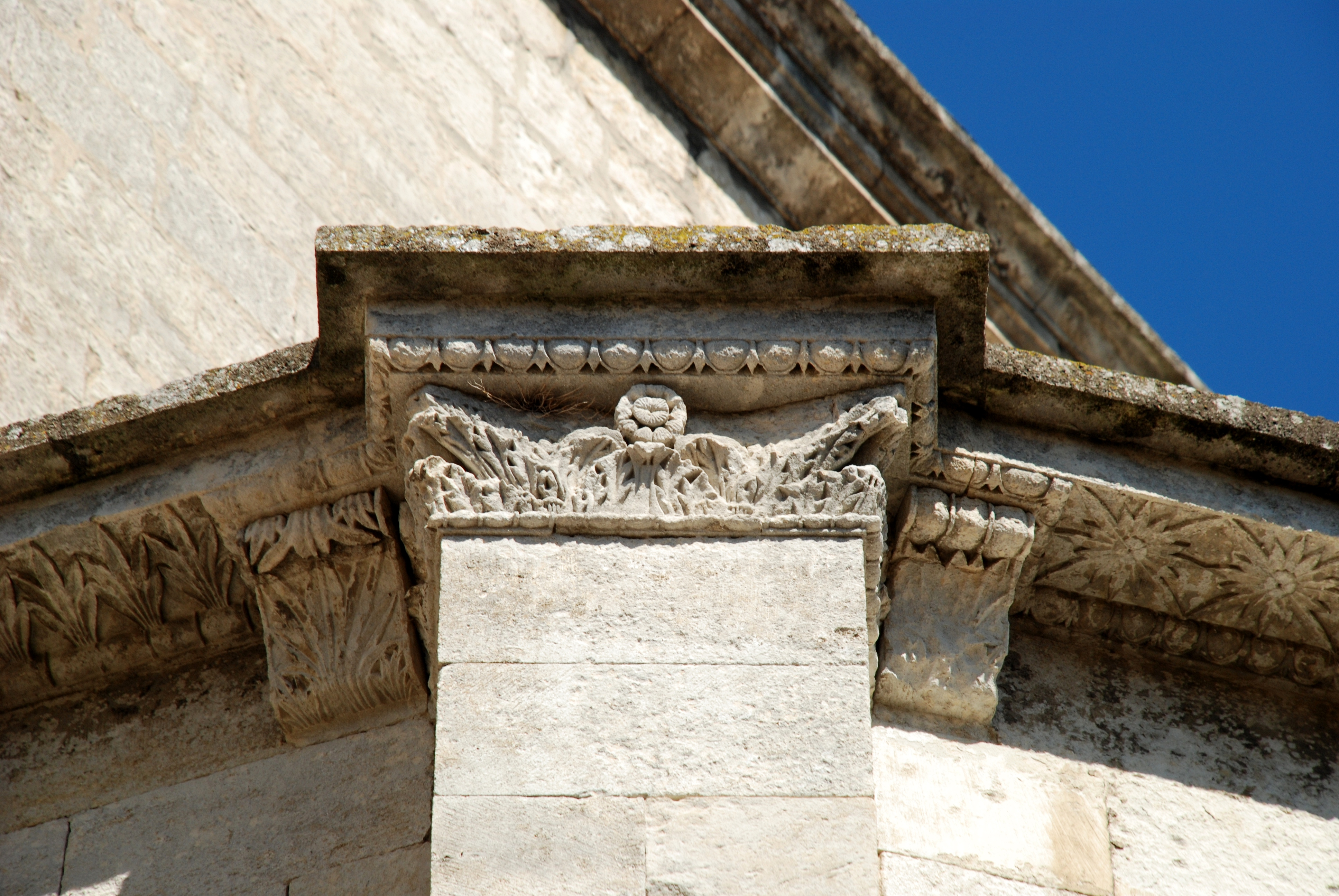 Cathédrale Notre-Dame de Saint-Paul-Trois-Châteaux